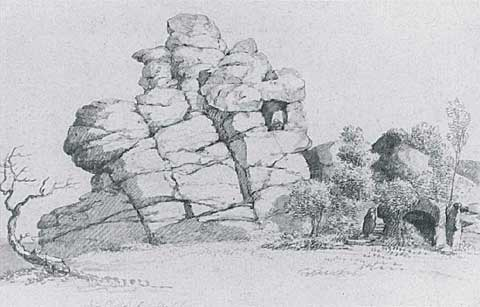 Die Klause bei Goslar (Klusfelsen)